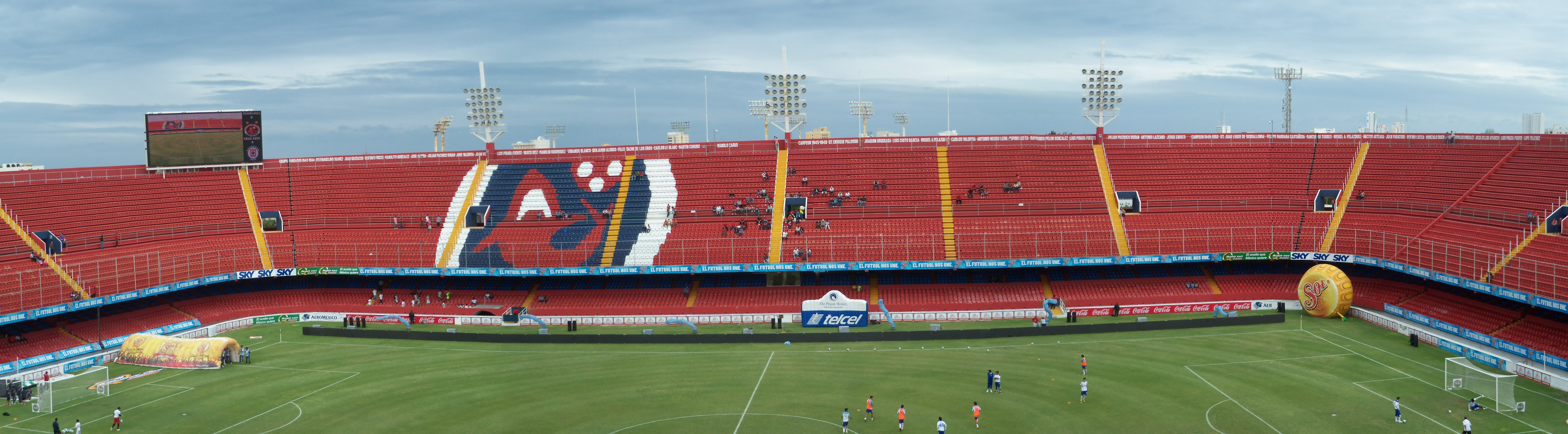 Vista panorámica del interior del estadio Luis Pirata Fuente